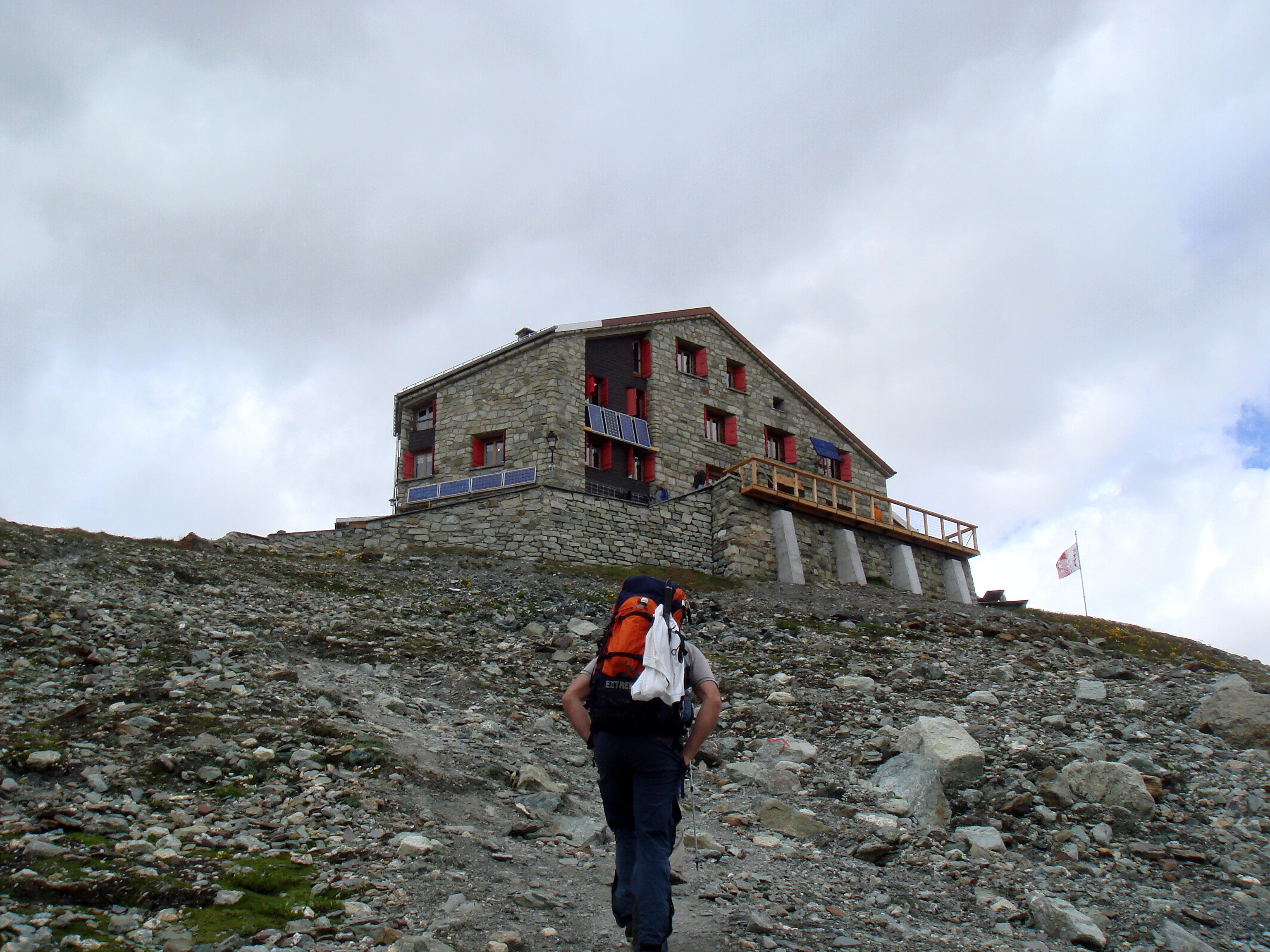 Dix Hut (Cabane des Dix)